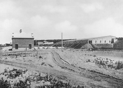 138. Рублевская насосная станцiя. Пескомойка, зданiе коагулированiя воды и предварительные фильтры.